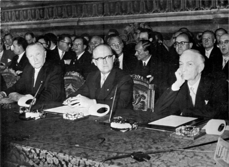 Zentralbild 1.4.1957 Verträge über Zollpakt und Eurotom unterzeichnet Die Verträge über den kleineuropäischen Zollpakt und über die westeuropäische Atomenergie-Gemeinschaft (Eurotom) wurden am 25.3.1957 in Rom von Regierungsvertretern der sechs Mitgliedsstaaten der Montan-Union unterzeichnet. UBz.: (v.l.n.r.) Bundeskanzler Adenauer, der für die Bonner Regierung unterschrieb, Staatssekretär Hallstein und der italienische Ministerpräsident Antonio Segni.